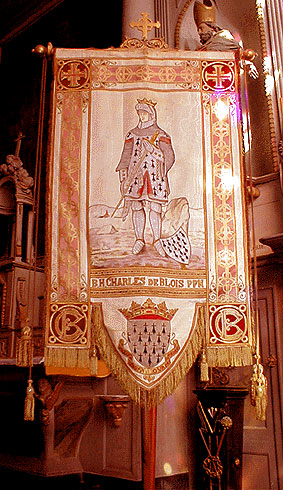 Ar Roc'h-Derien. Banniel Charlez Bleaz